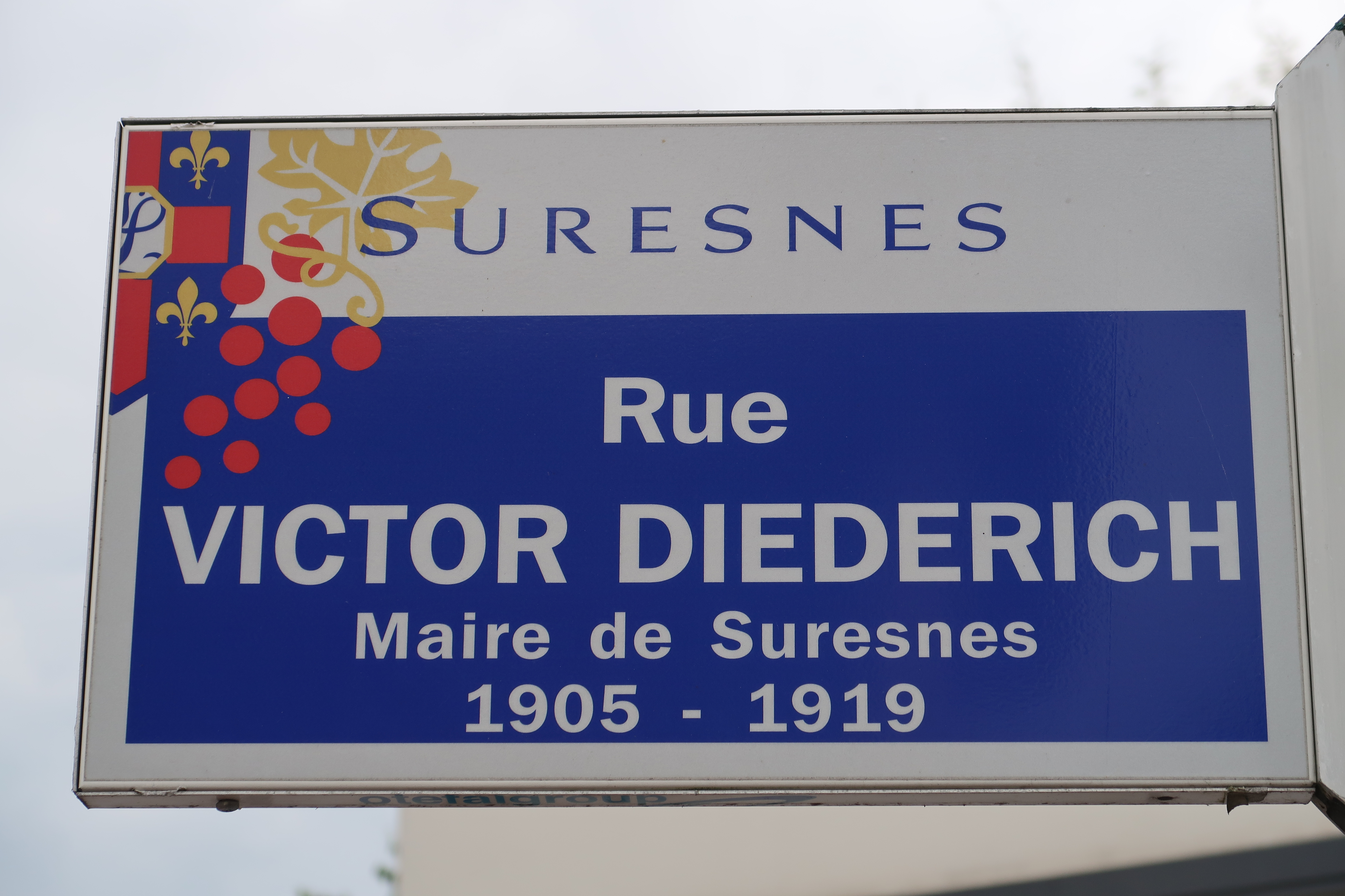 Plaque de la rue Victor-Diederich à Suresnes (Hauts-de-Seine).